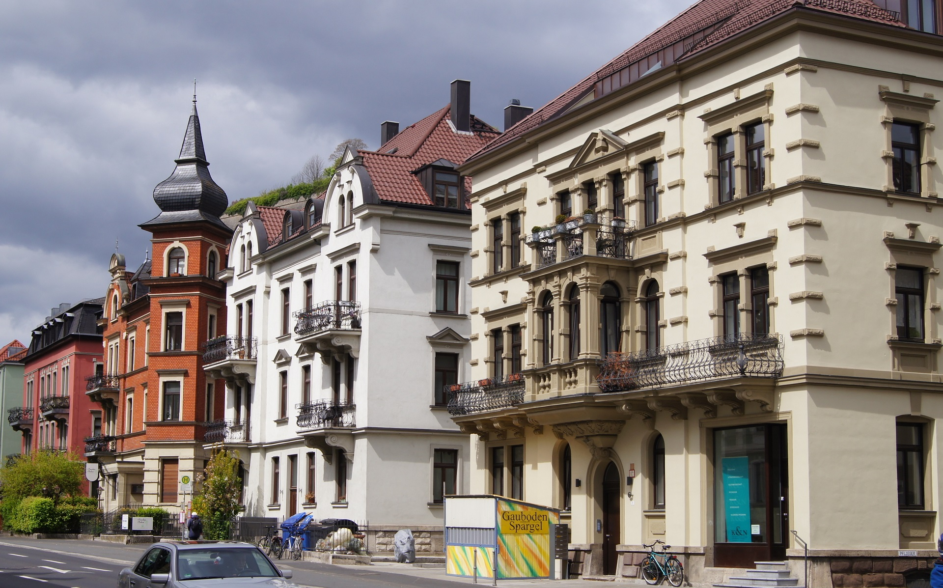 Denkmalgeschützte Mietshäuser, Würzburg - Leistenstraße 2-8